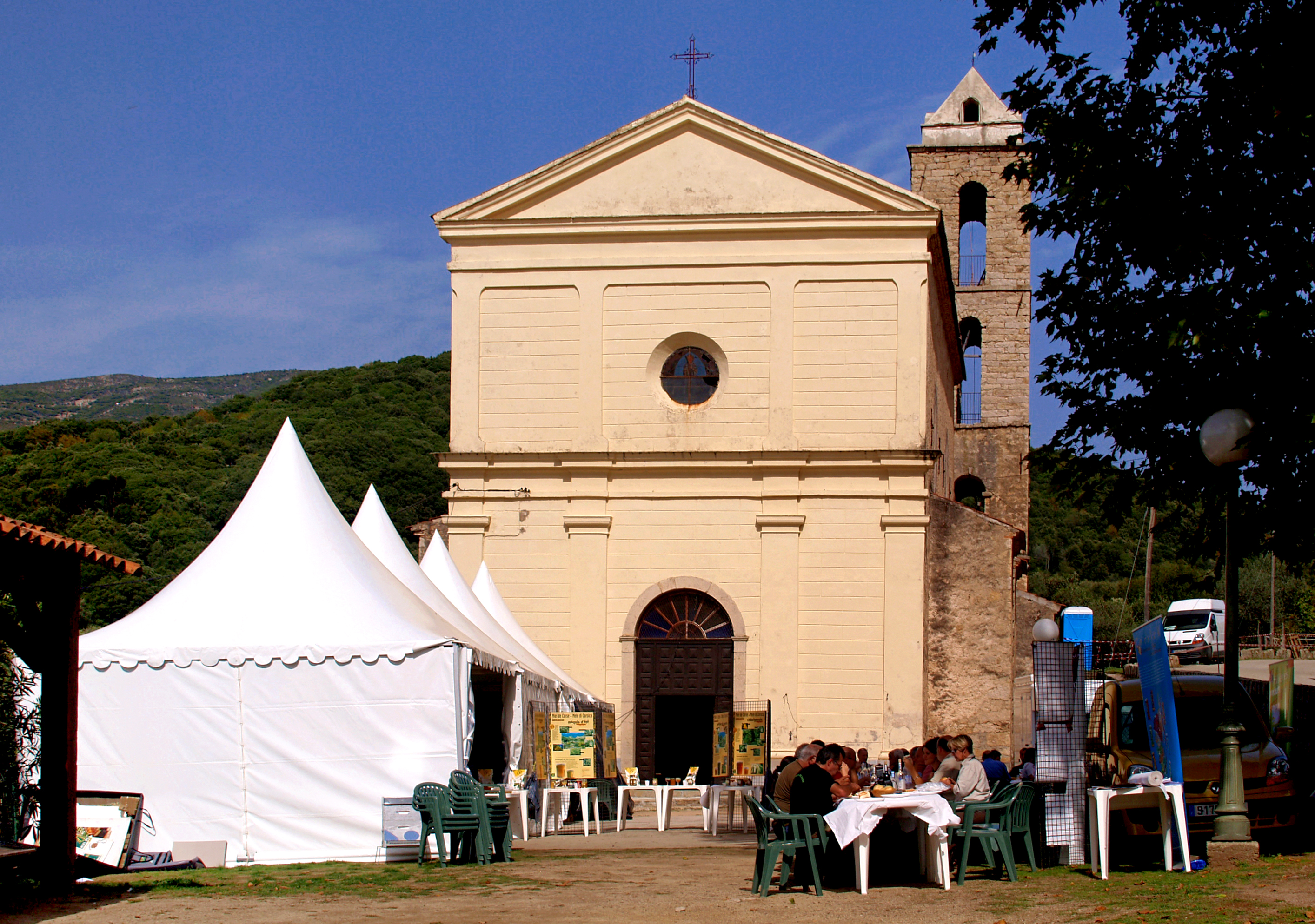 Murzo, Ouest Corse (Corse) - Église Saint-Laurent